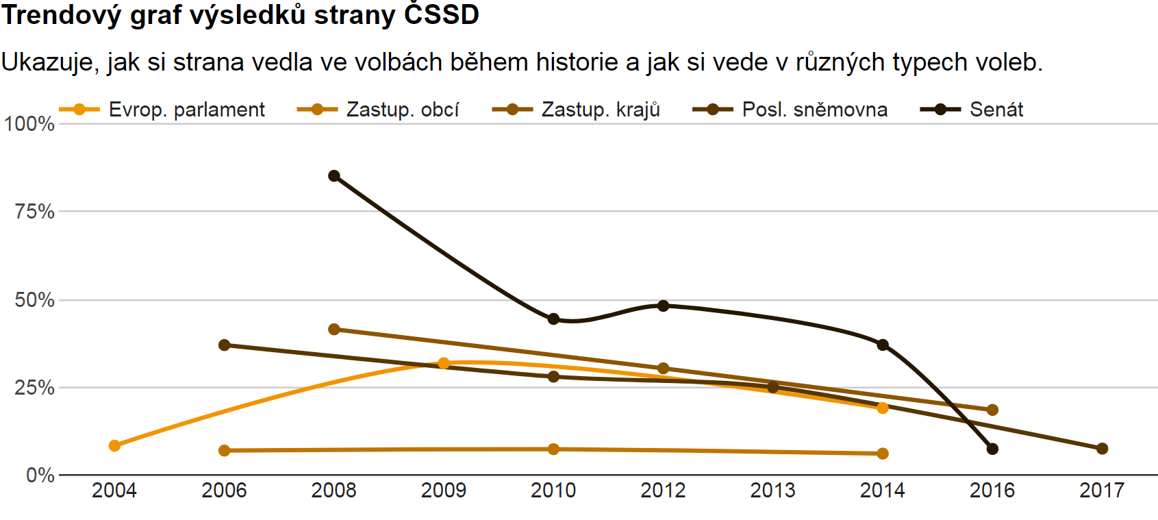 ČSSD - Výsledky voleb, získané mandáty, trendy od 2004 do 2017. Poslanecká sněmovna, senát, kraje, obce, evropský parlament.